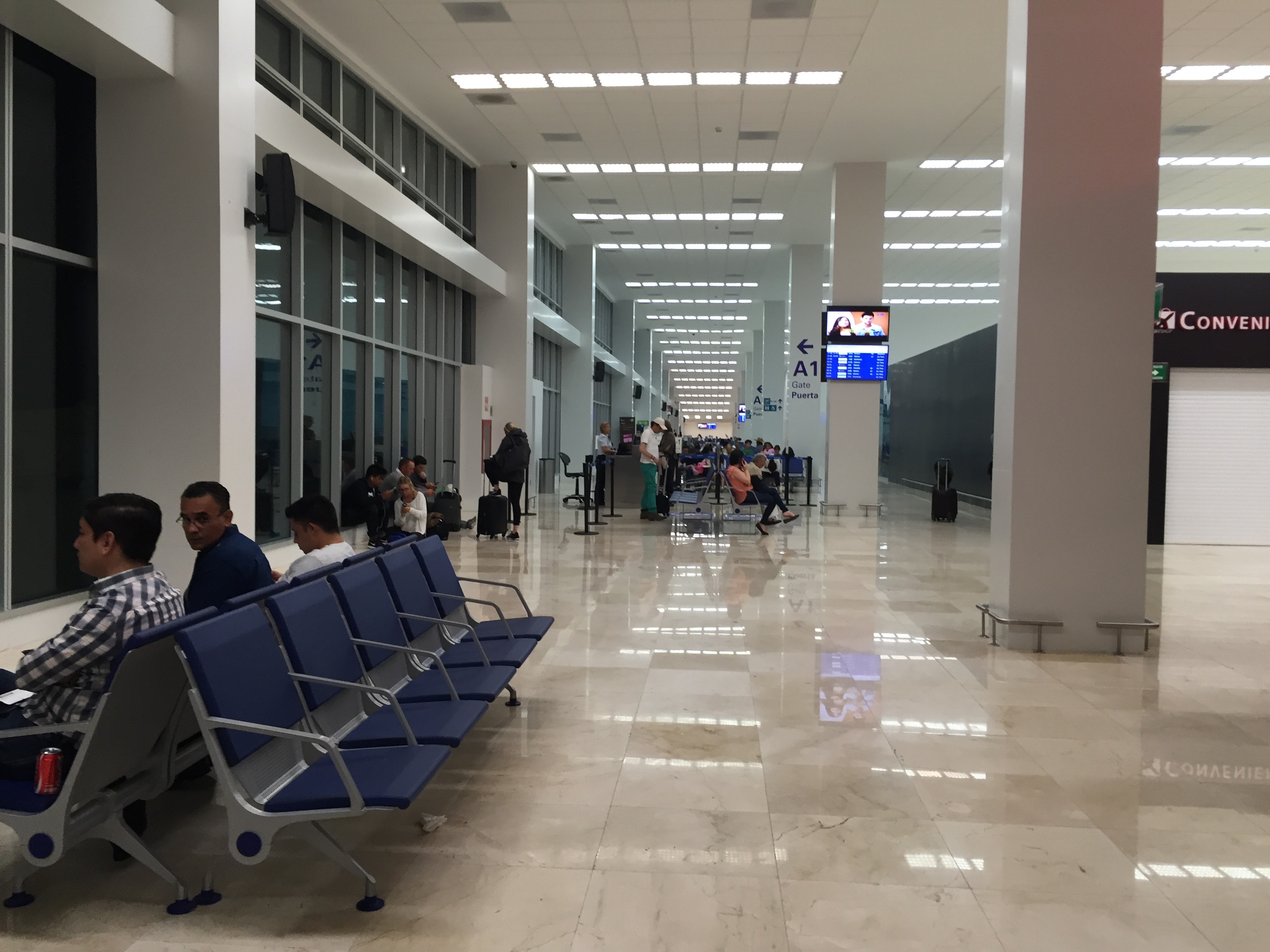 Puerta A1 del Aeropuerto Internacional de Veracruz.